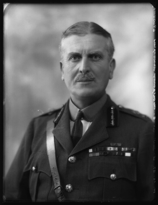 Archie Massingberd